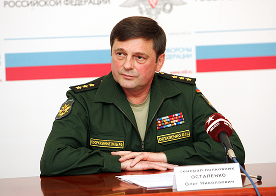 Олег Николаевич Остапенко (род.1957) — российский военный деятель